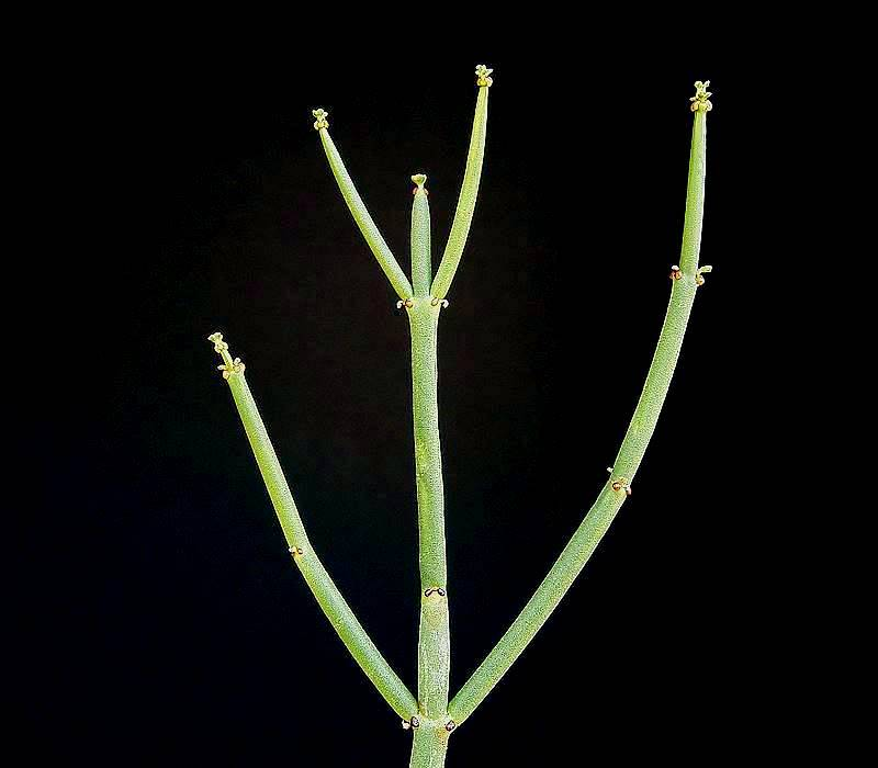 Euphorbia burmannii